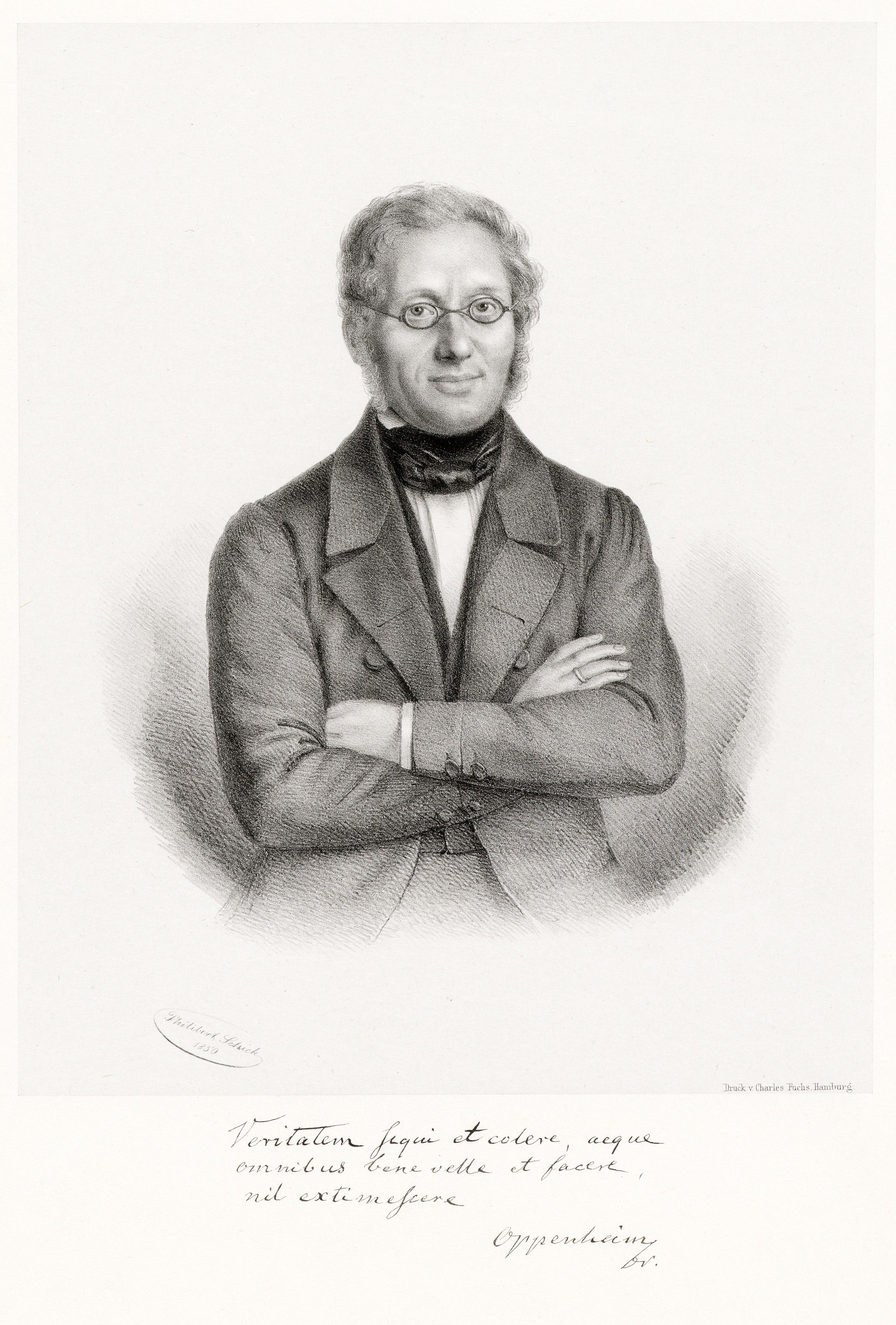 Bildnis von Friedrich Wilhelm Oppenheim